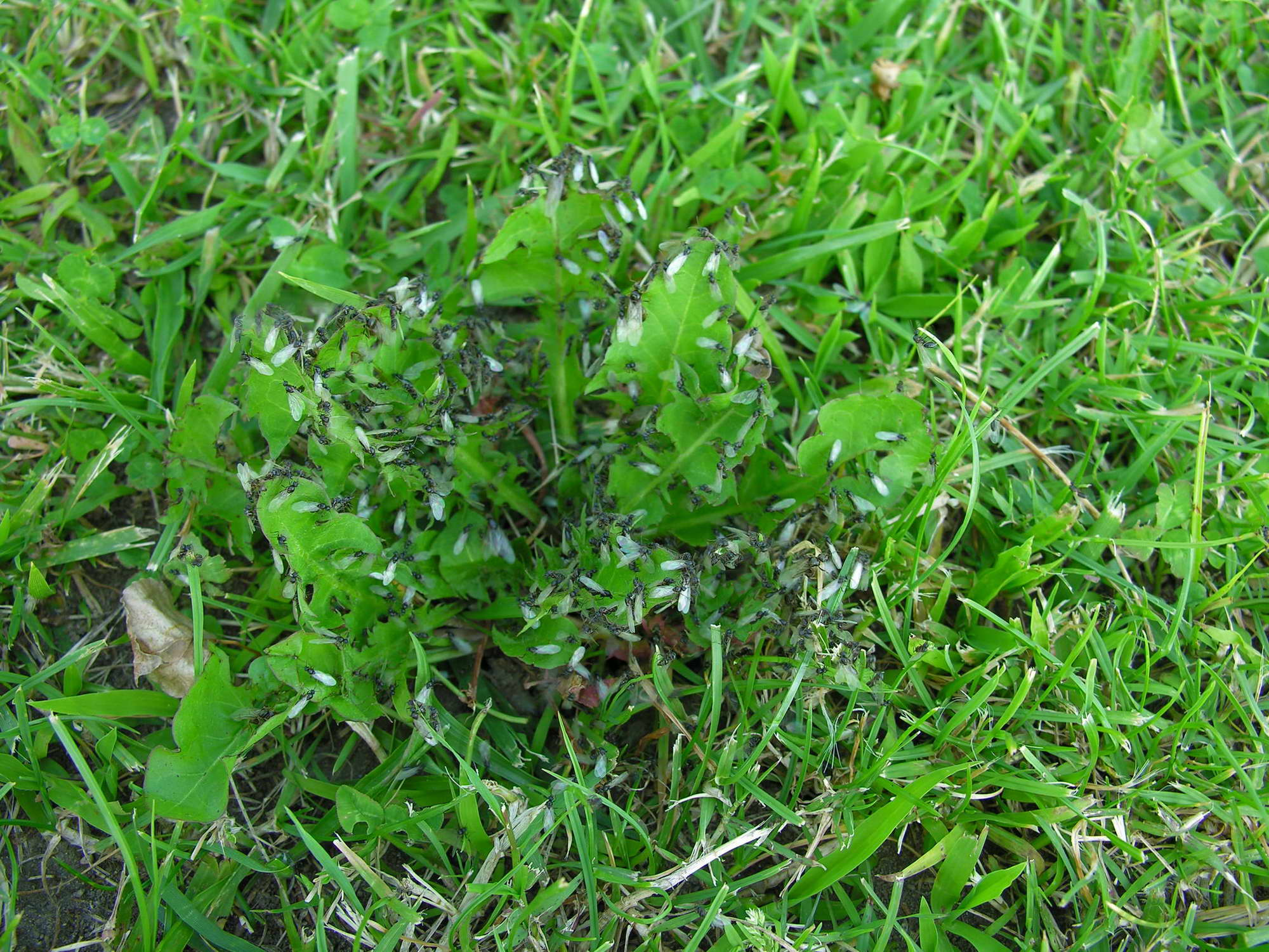 Formiga voadora